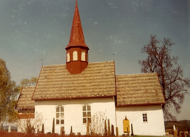 Hedenstad kirke